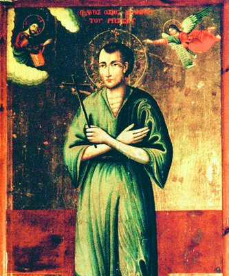 «Прав. Иоанн Русский. Икона. Ок. 1790 г. (ц. прав. Иоанна Русского в г. Прокопи на о-ве Эвбея)»